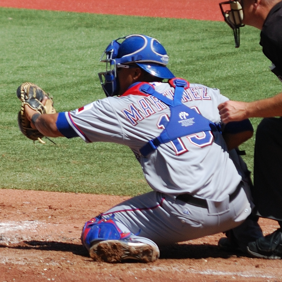 Luis Martinez